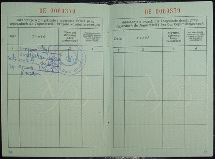 Książeczka walutowa z roku 1979, strony z potwierdzeniem dokonania zakupu dewiz (tu: "ryczałt 135$").